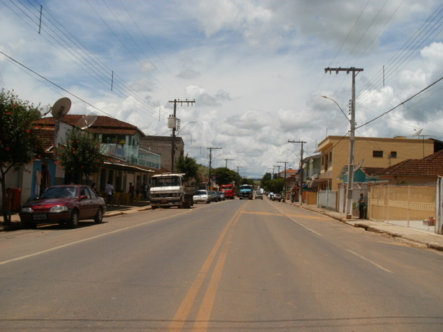 Vista de uma rua em Piranguinho, Minas Gerais, Brasil.